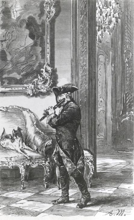 Friedrich der Große beim Flötenspiel von Adolph von Menzel.